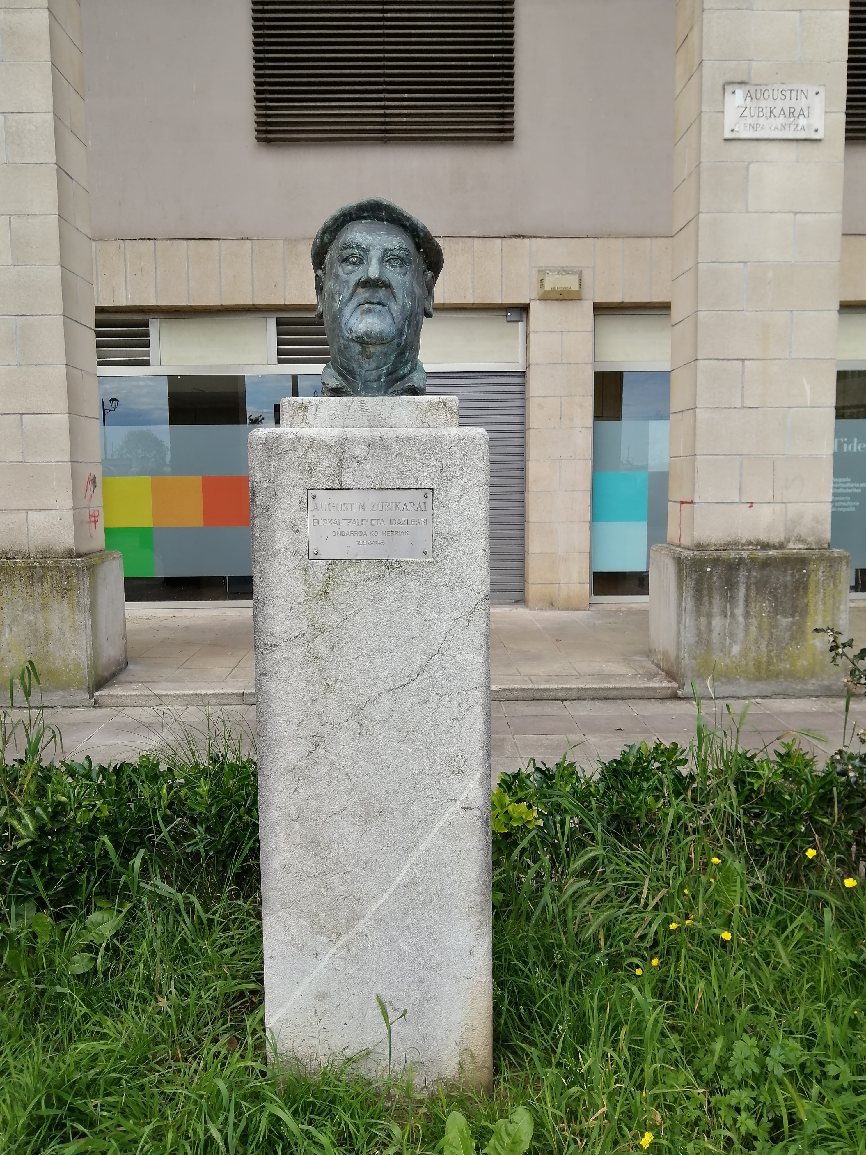 Augustin Zubikarairen bustoa izen bereko enparantzan Ondarroan